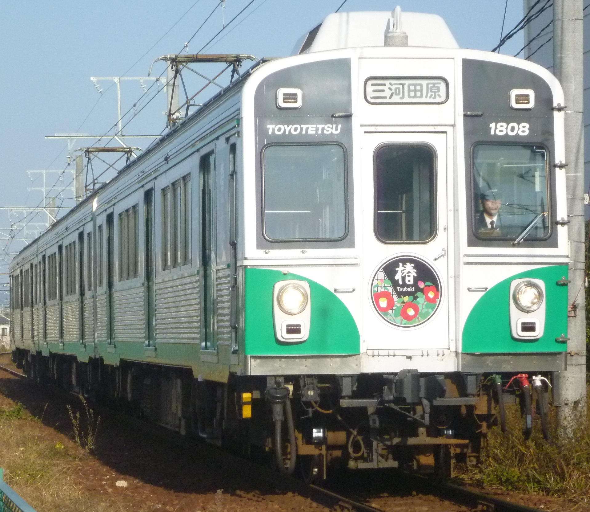 2014年11月、新豊橋～柳生橋